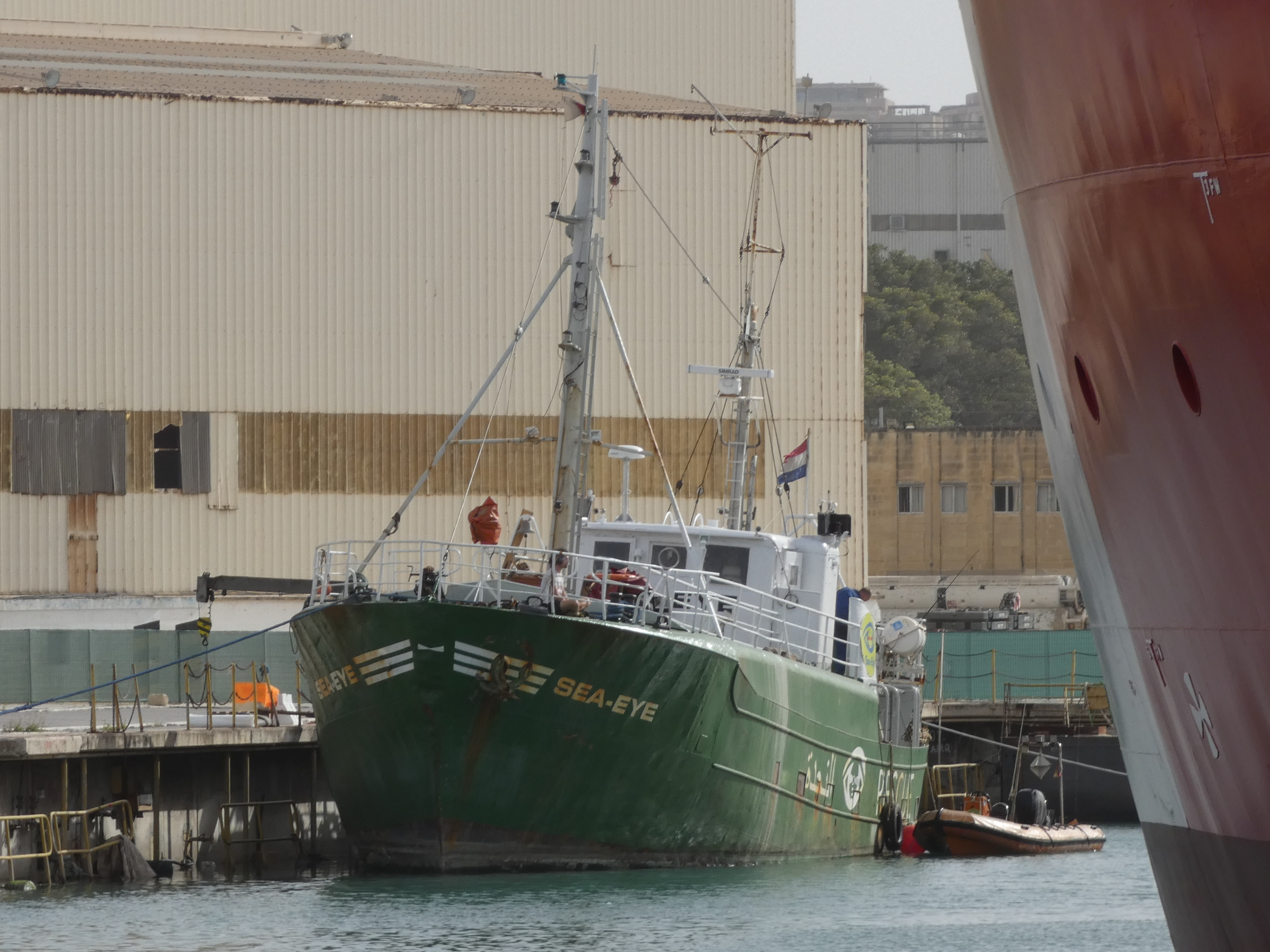 Sea-Eye in Valletta